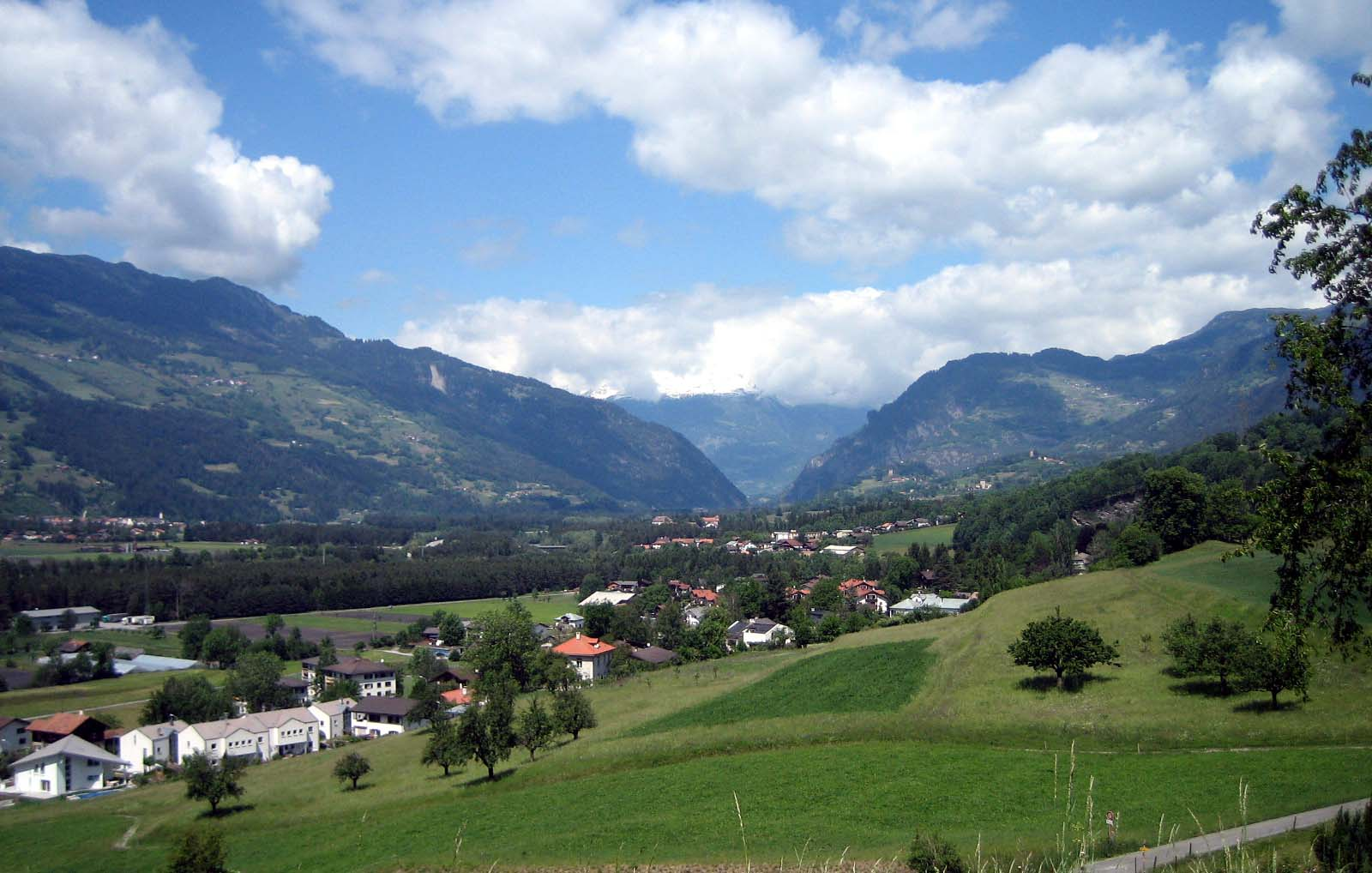 Domleschg Richtung Nord